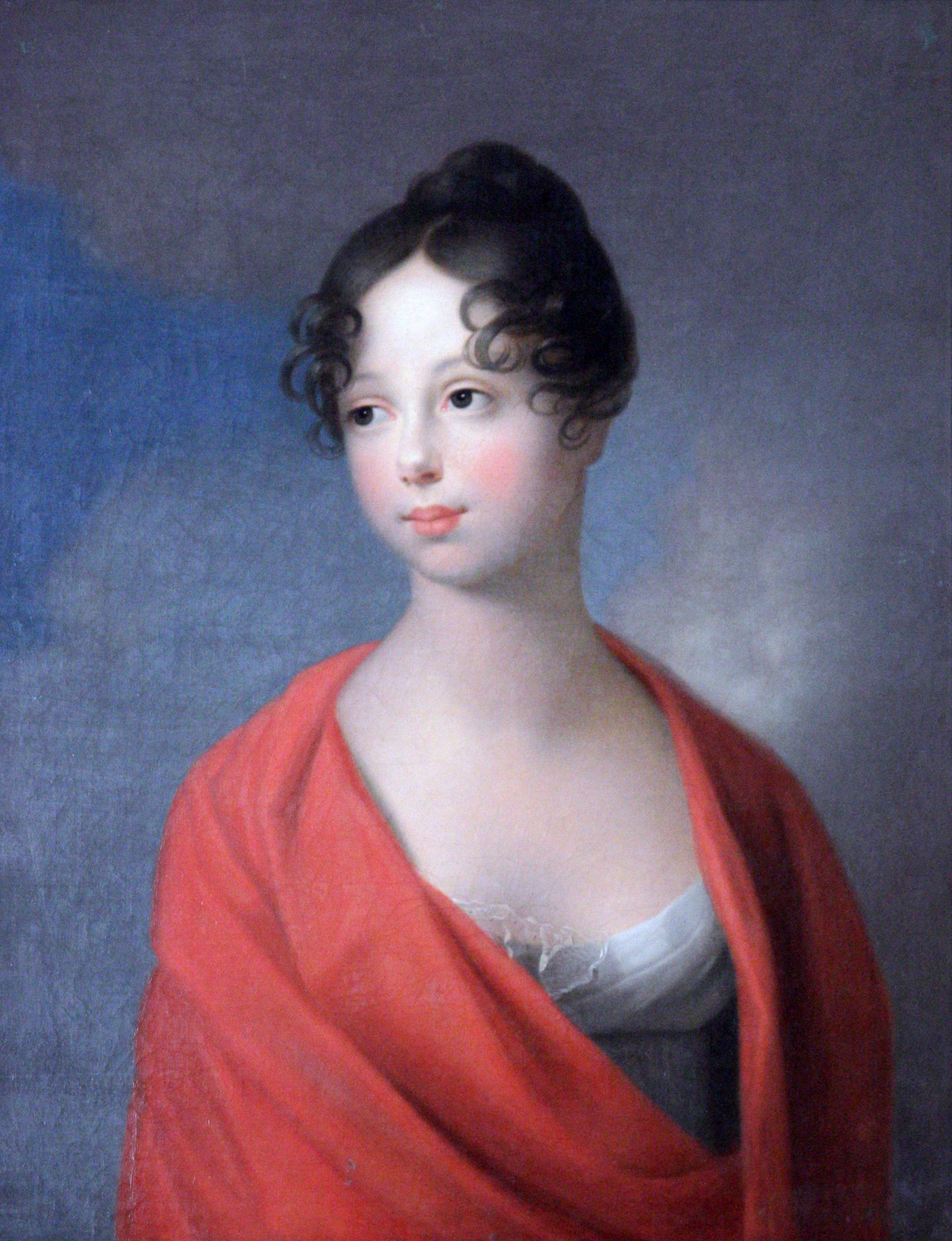 Königin Katharina, Großfürstin von Russland. Gemälde von Johann Friedrich August Tischbein im Residenzschloss Ludwigsburg